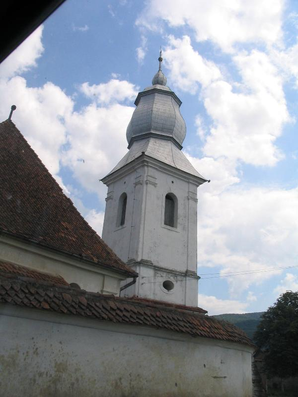 A lisznyói református templom